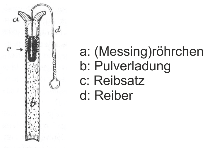 Beschreibung der Schlagröhre und ihrer Einzelteile